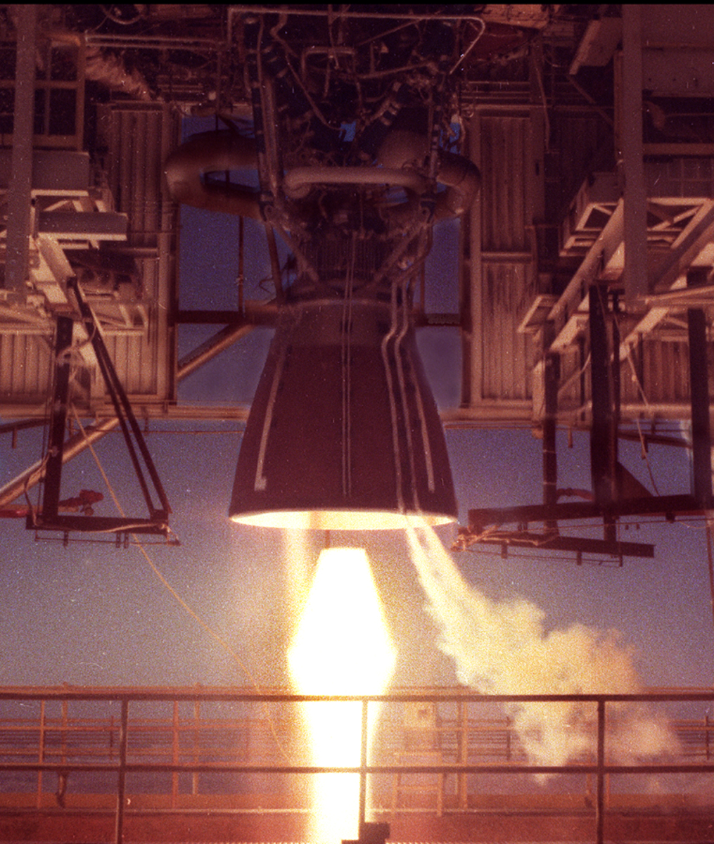 RS-68 Rocket Engine for Delta IV